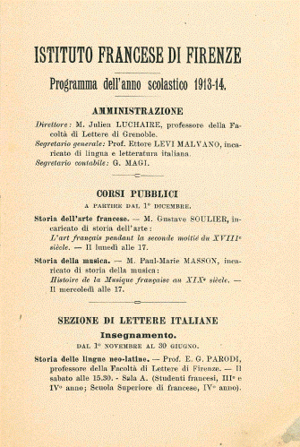 Le programme des cours - Année 1913/1914 - Institut français de Florence.